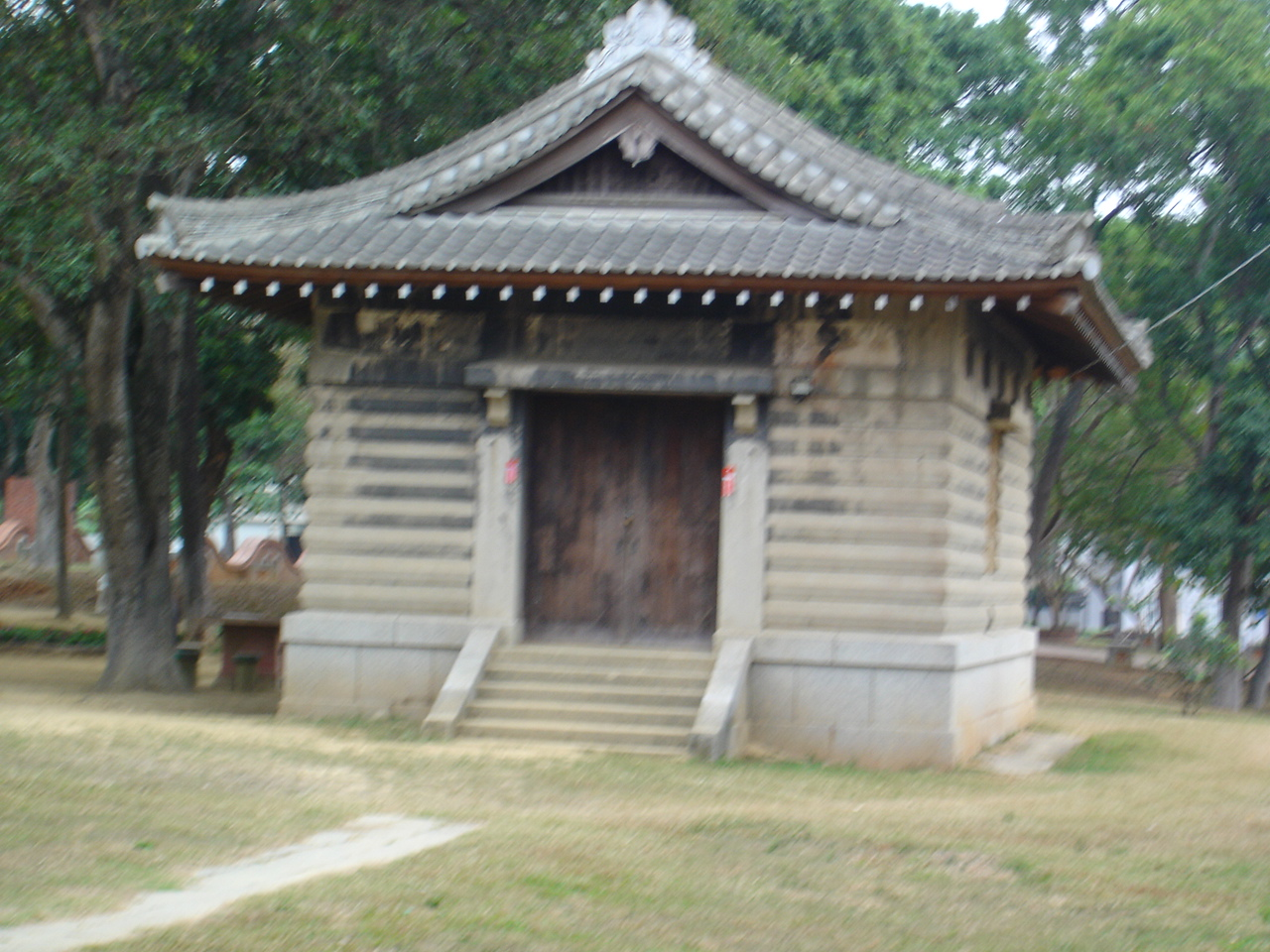 臺灣嘉義神社之祭器庫，2006年1月21日攝影。